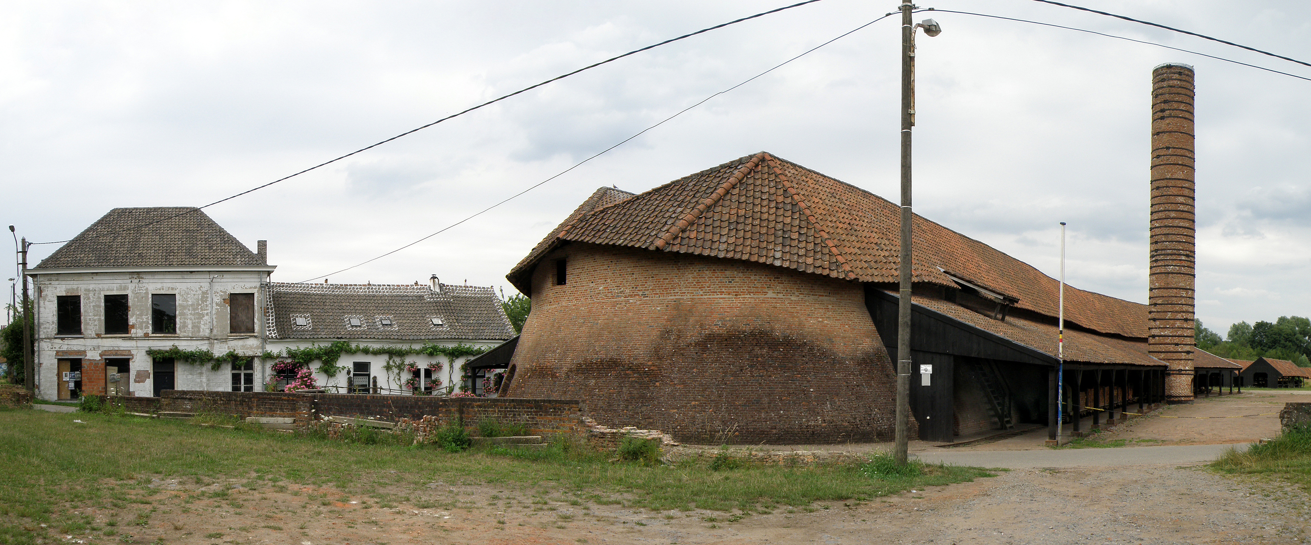 Boom (prov. Antwerpen, België). Steenbakkerij Frateur, thans steenbakkerijmuseum ’t Geleeg.